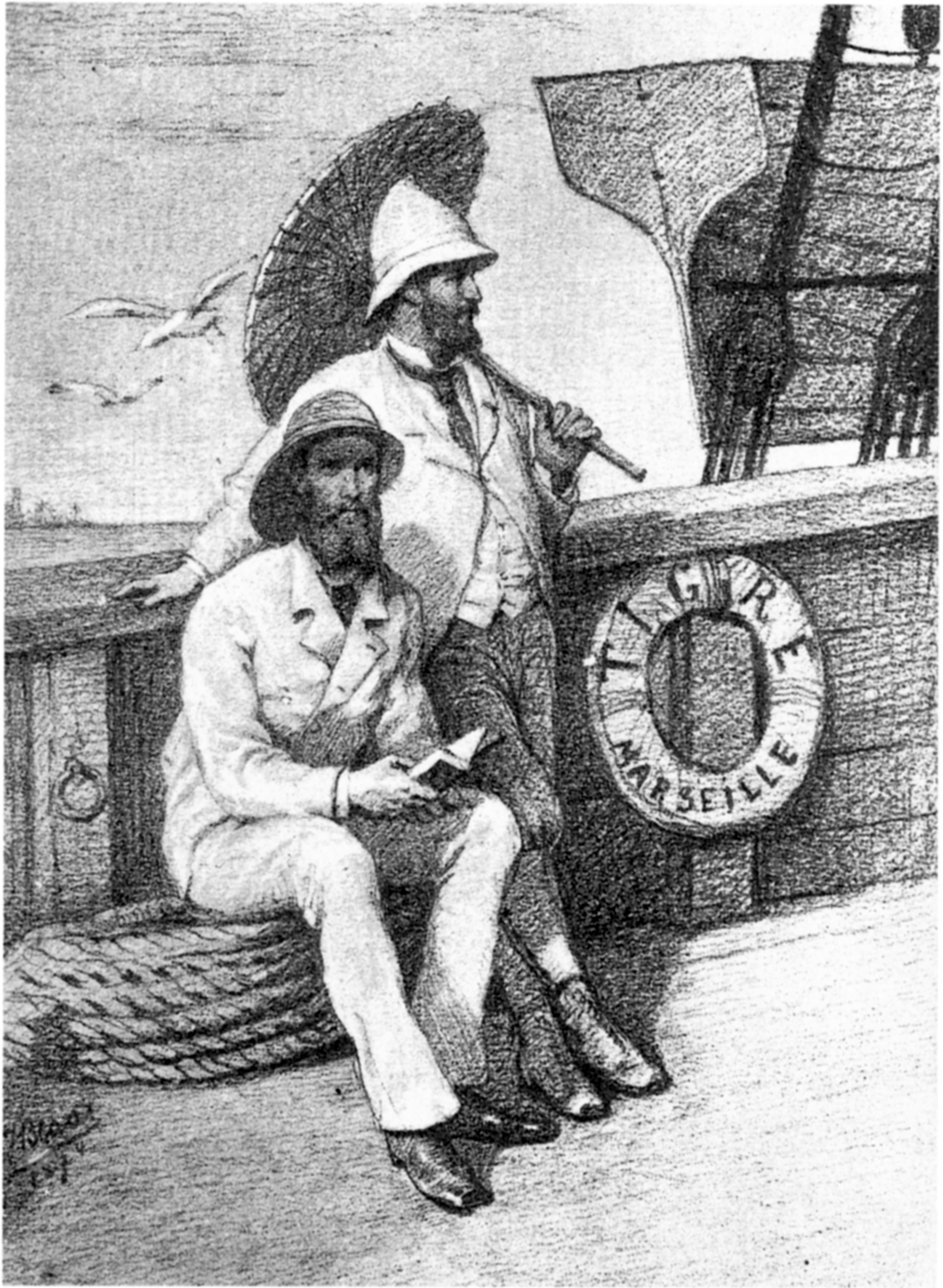 Josef Freiherr von Doblhoff (1844–1928) (rechts), Julius Ritter von Blaas (1845–1922)